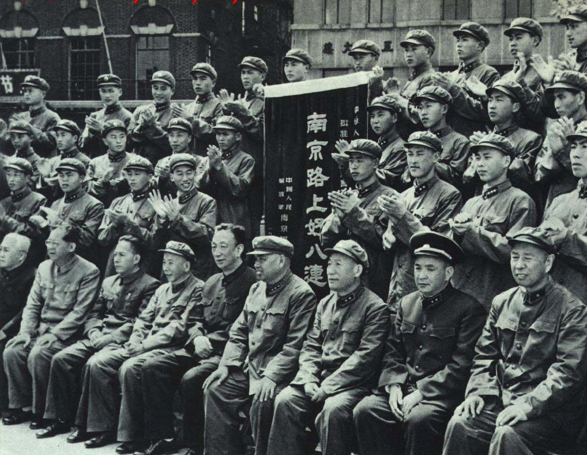 1963-08 1963年 南京路上好八连